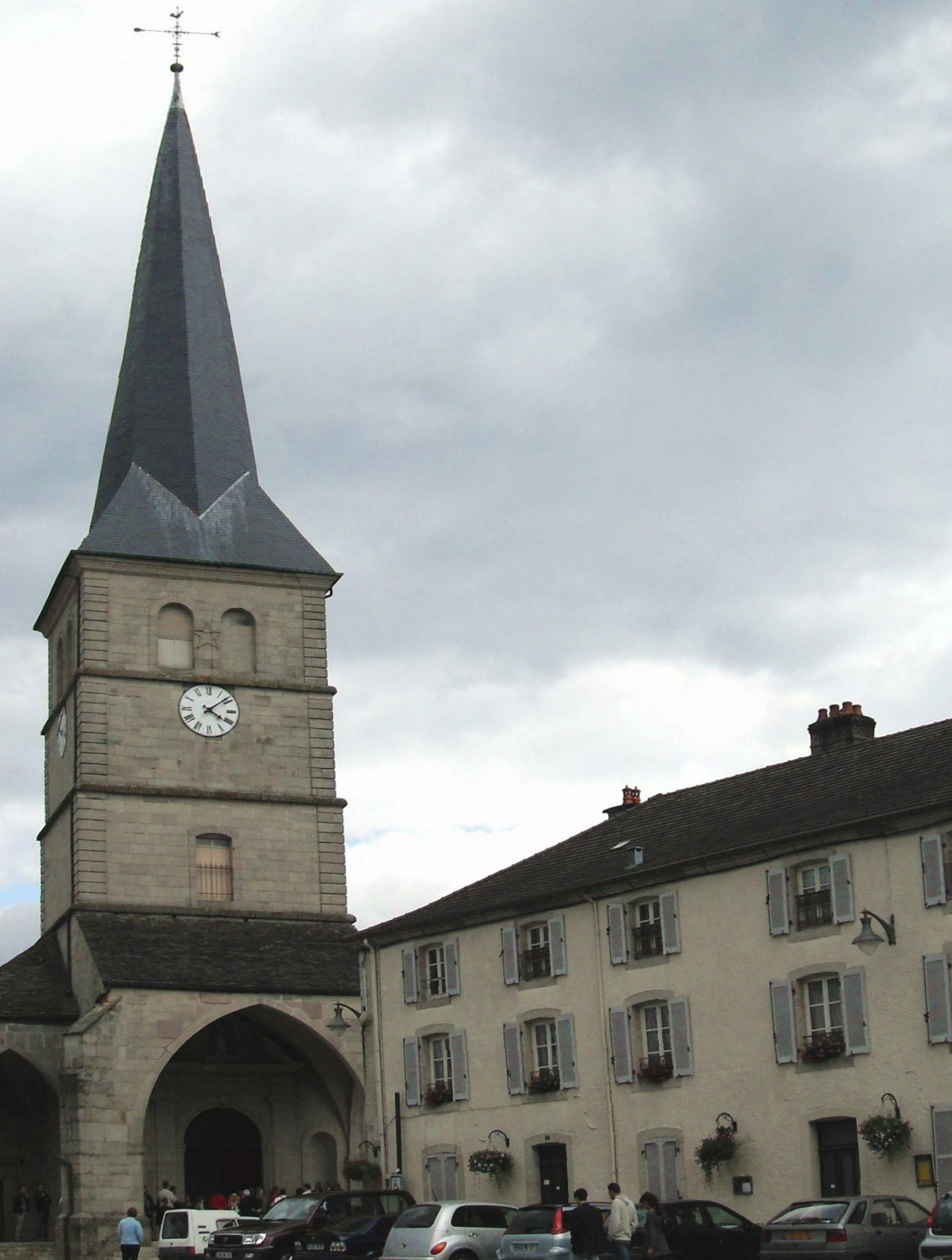 L'église Notre-Dame de Val-d'Ajol